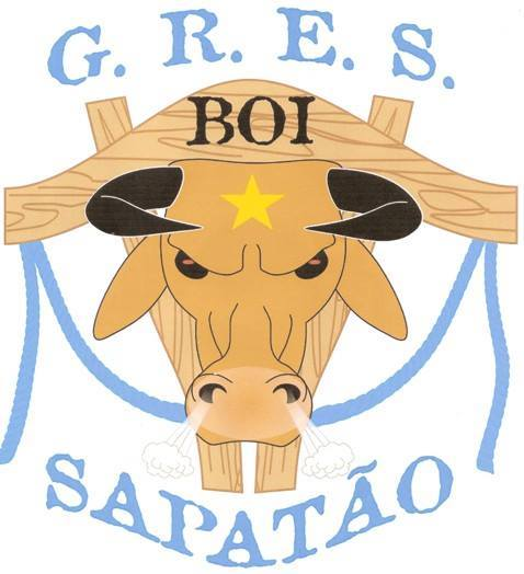 GRES Boi Sapatao